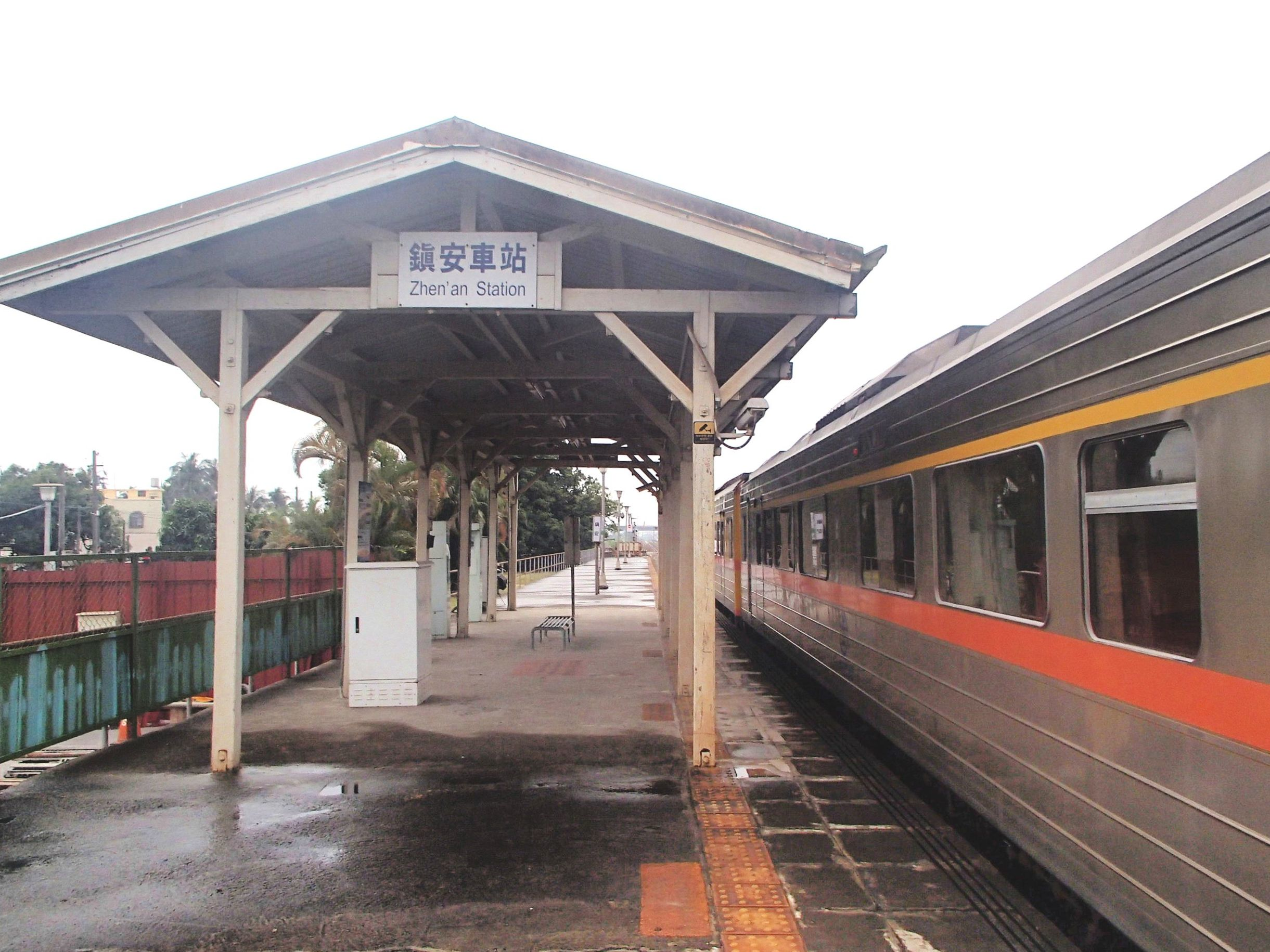 鎮安